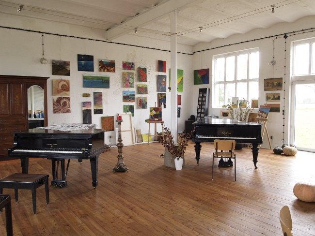 Der Veranstaltungs- und Unterrichtsraum im Atelier Pamitz